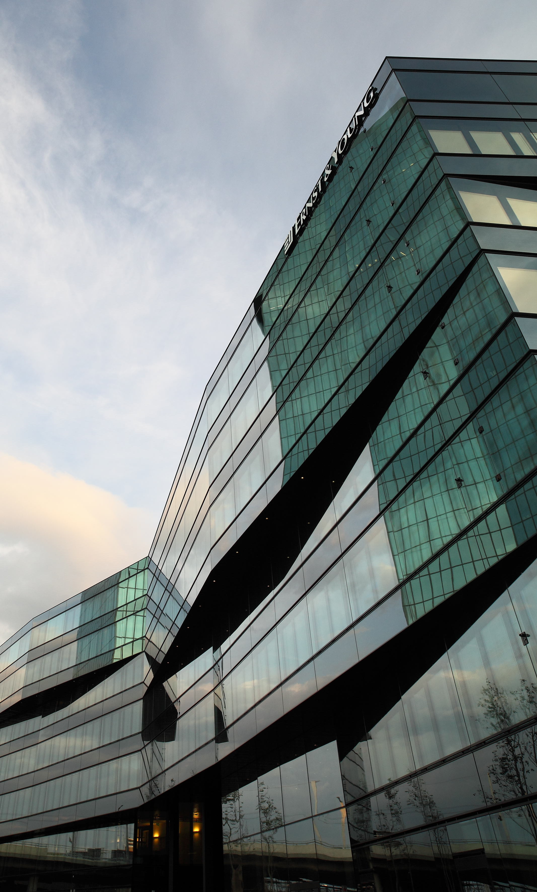 Aussenansicht der Unternehmenszentrale "Platform" von Ernst & Young Schweiz